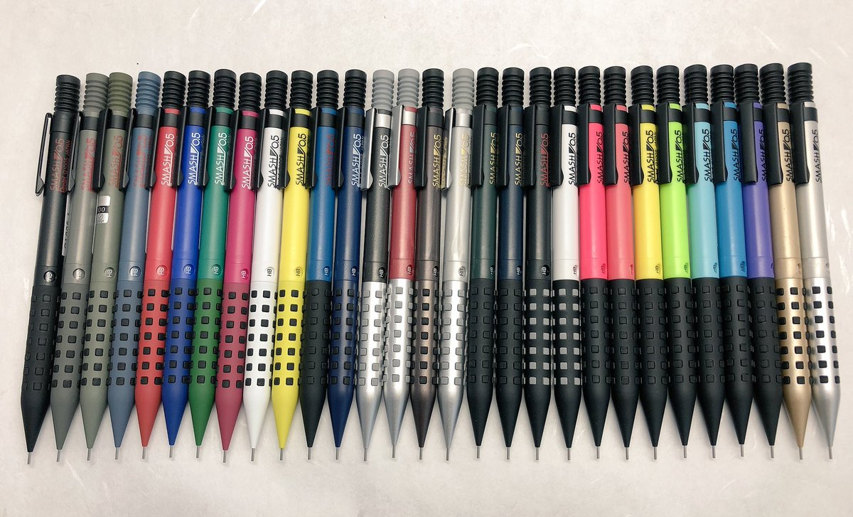 @yone_bungu